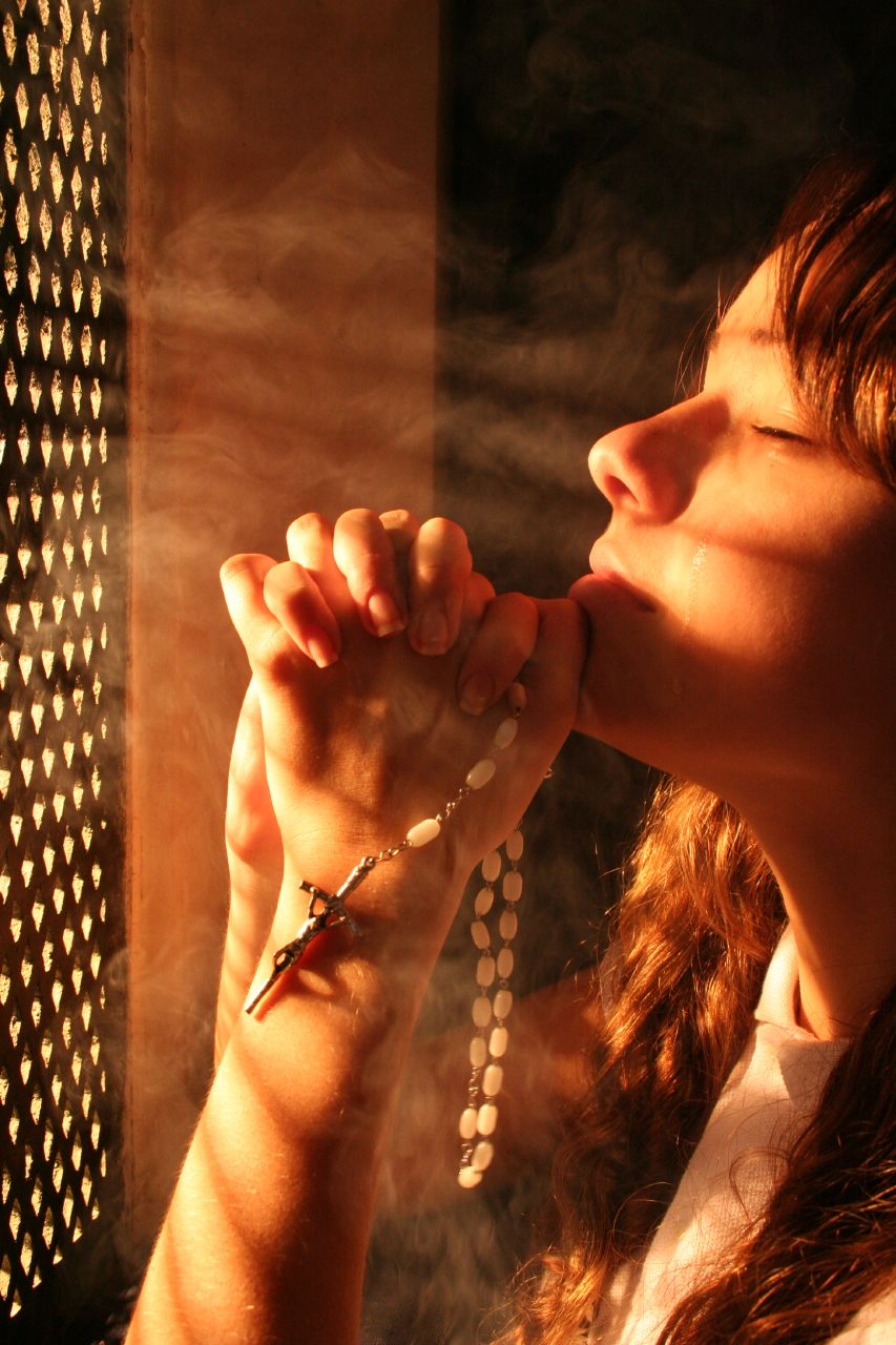 Modelo: Gabriela Schmidt Local: Igreja Matriz, Blumenau / SC